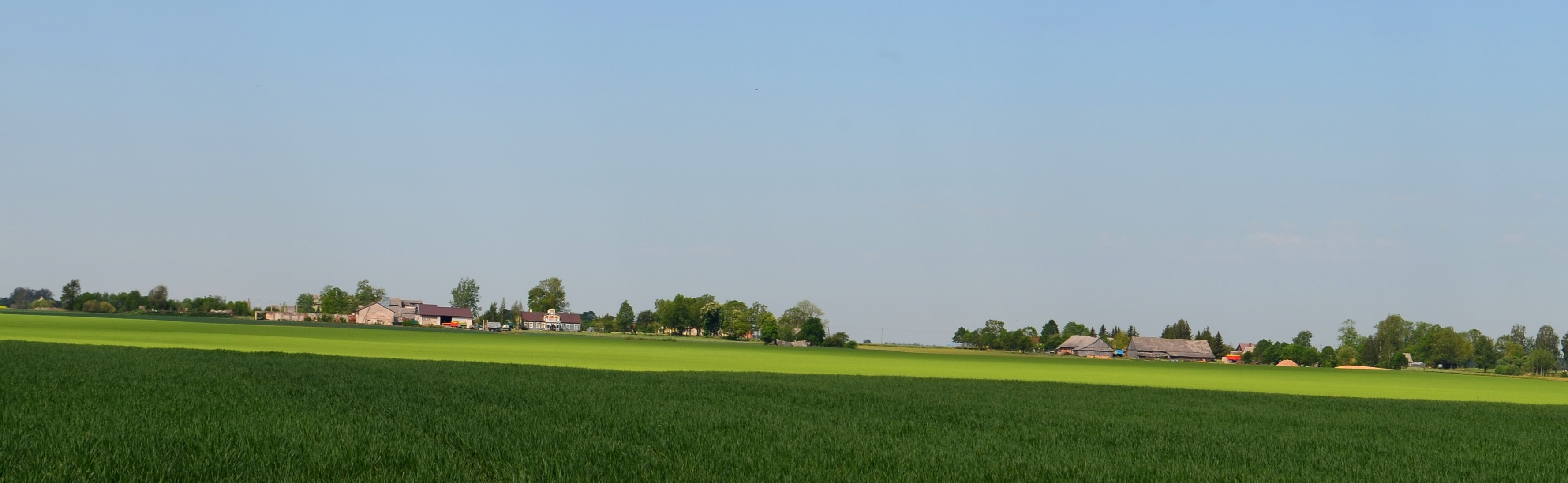 Vincgalys iš pietryčių, Kėdainių r.